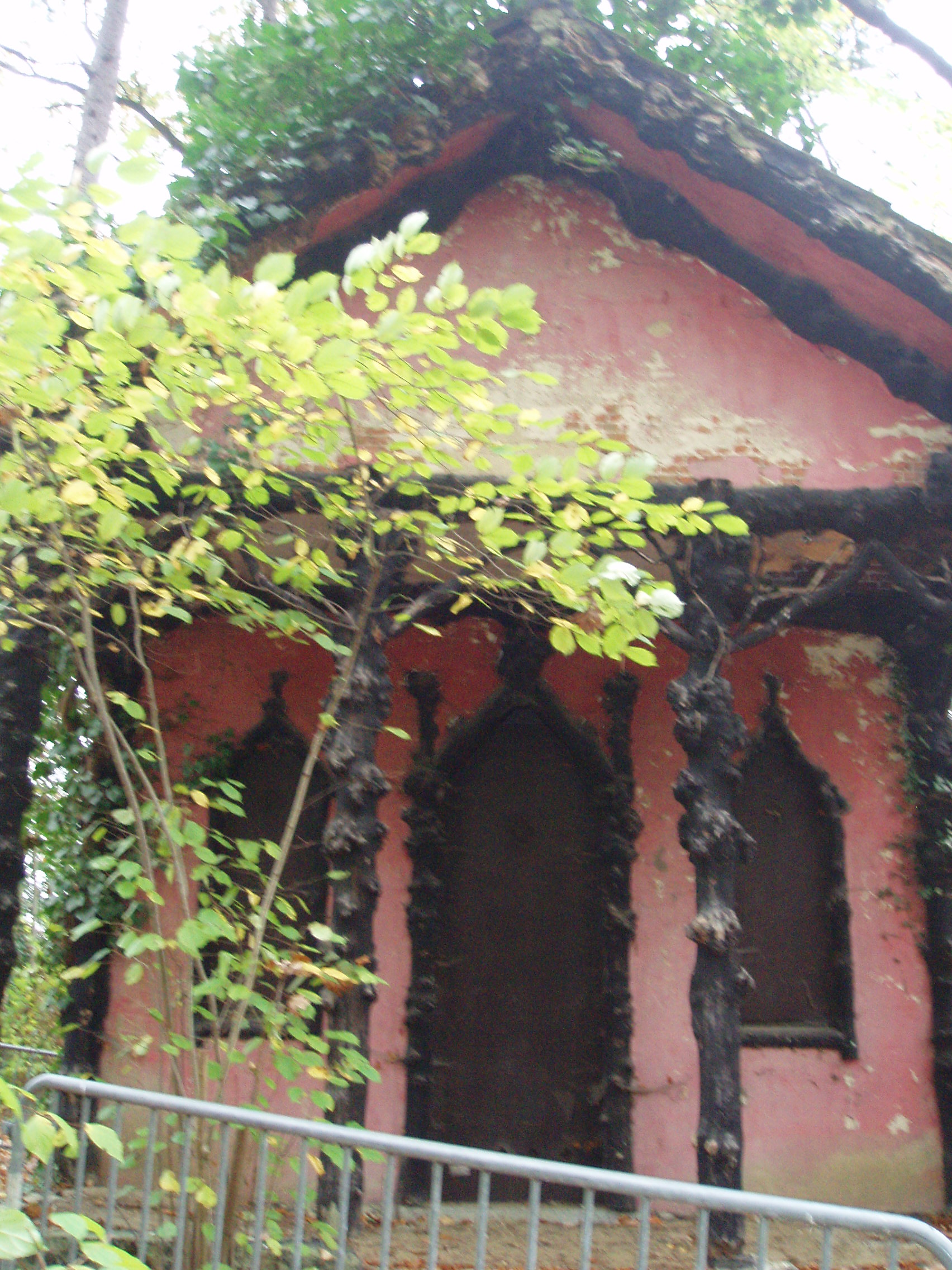 Paviljoen kasteel Le Paige